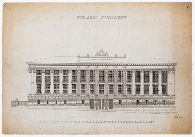 Kansallisarkiston julkisivu. Kruunuhaka, Helsinki. "Item: RakH II Ibb. 2:/- - 6-10. [Helsinki, Valtionarkisto: julkisivut; asemapiirros; lisärakennus]." kuvailutiedot